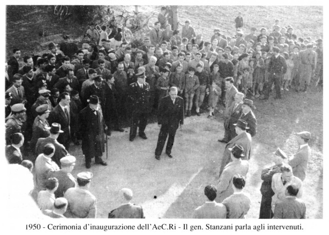 Il generale Mario Stanzani parla agli intevenuti alla cerimonia di inaugurazione dell'Ae.C.I. di Rieti